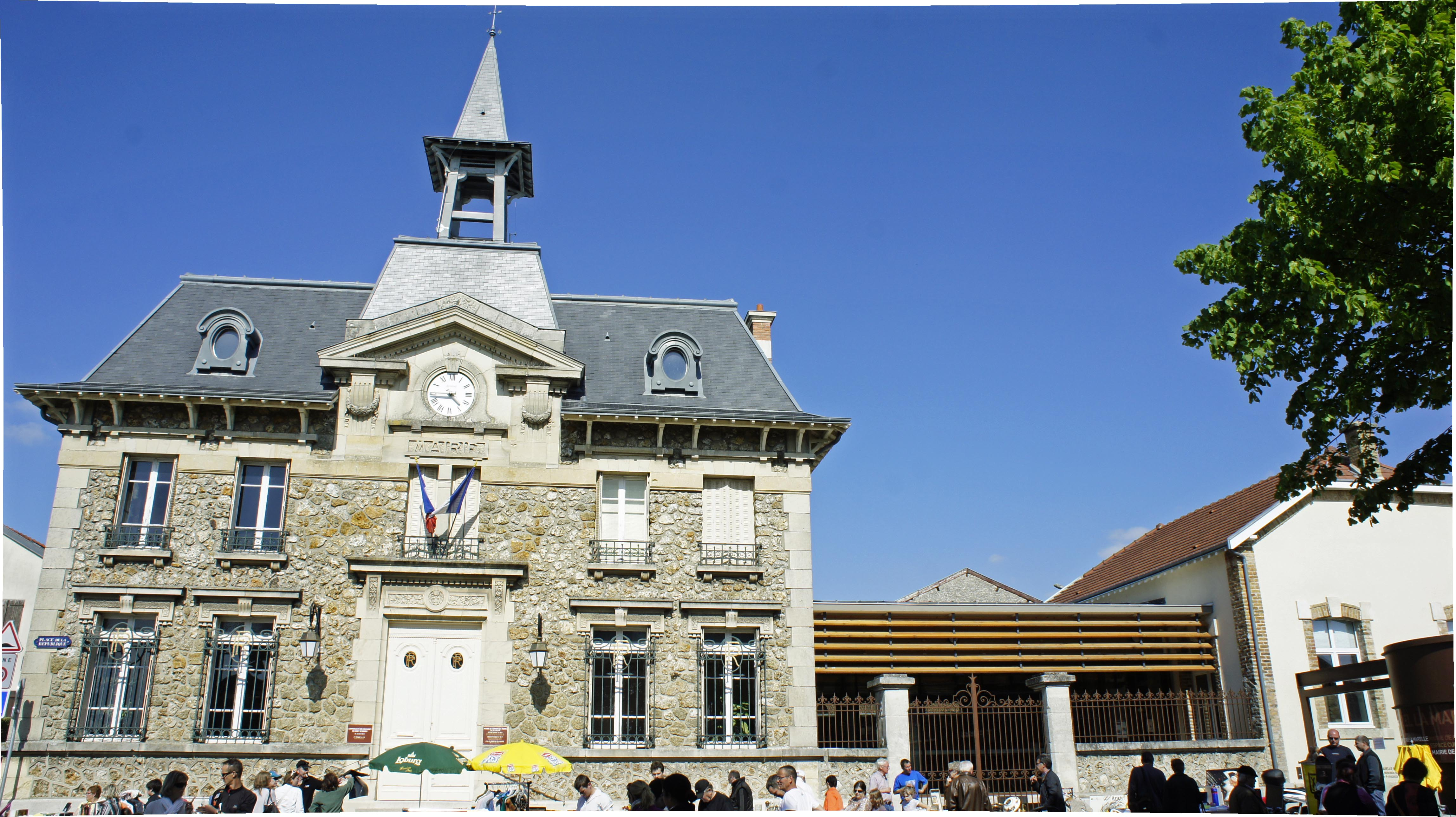 La Mairie de Cernay-les-Reims un jour de borcante.